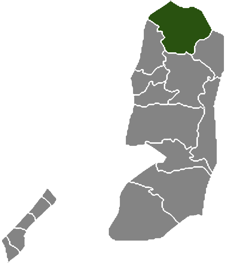 Palestine governorate Jenine